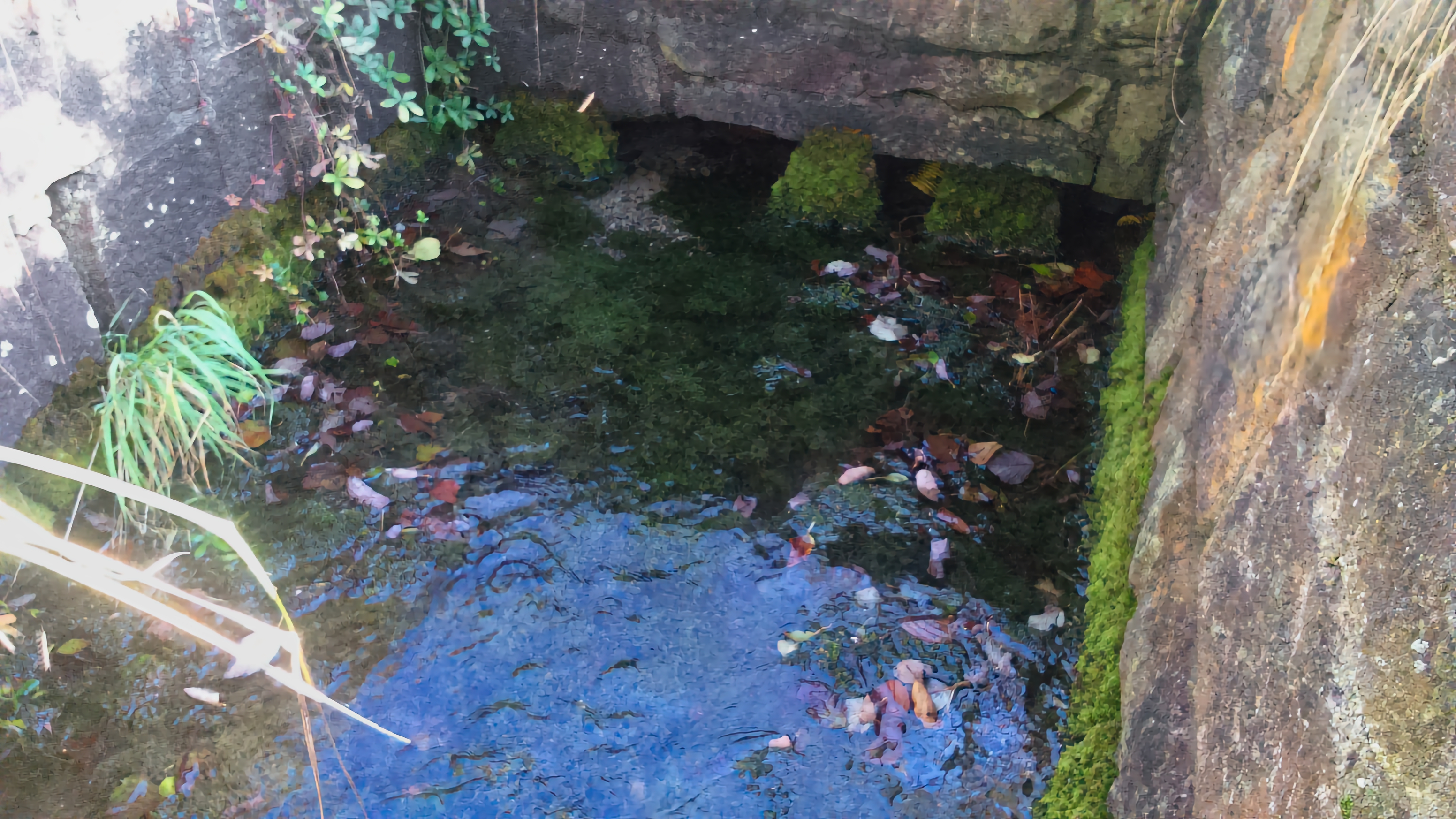 Die Quelle des Erlenbaches bei Erlenbach b. Marktheidenfeld